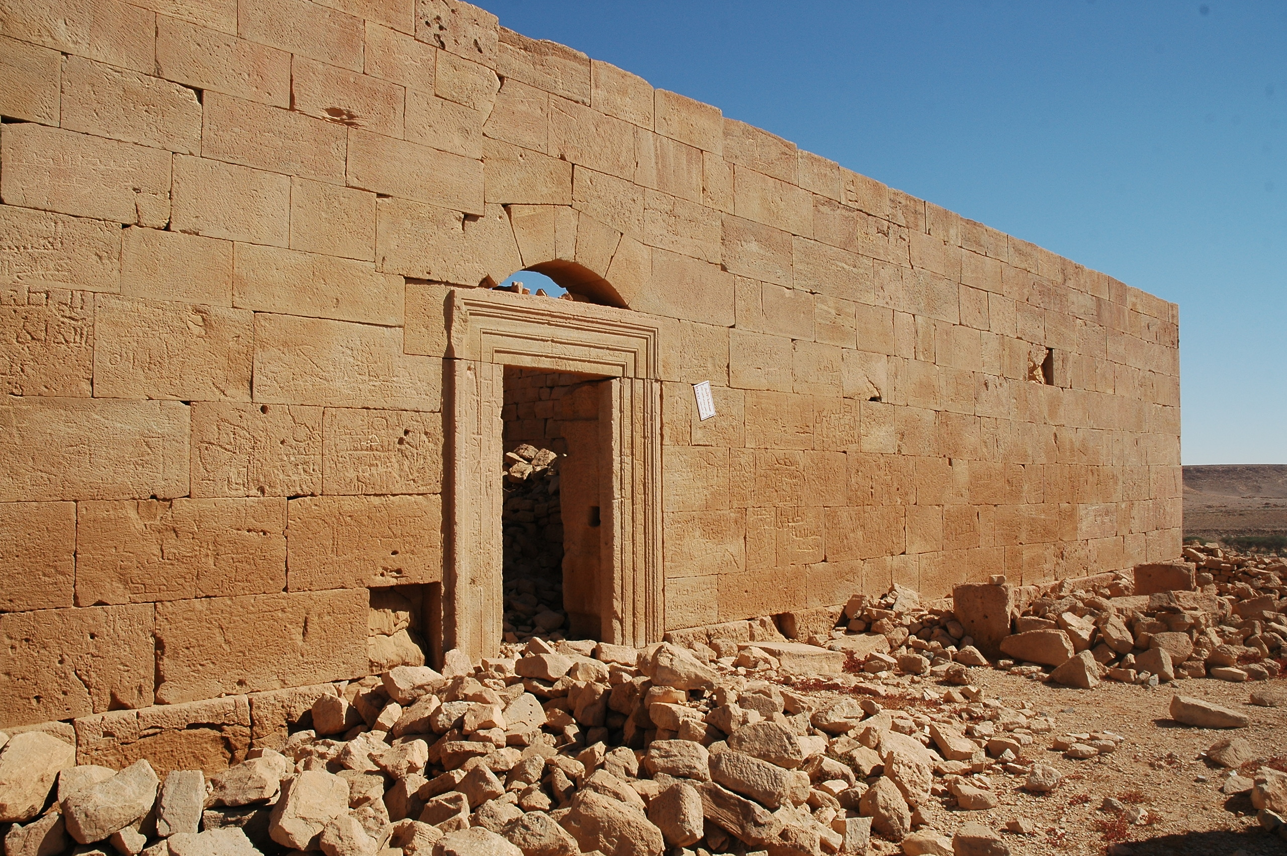 Qasr Banat ("kasteel van het meisje") is een oud-Romeins centenarium dat deel uitmaakte van de Limes Tripolitanus.